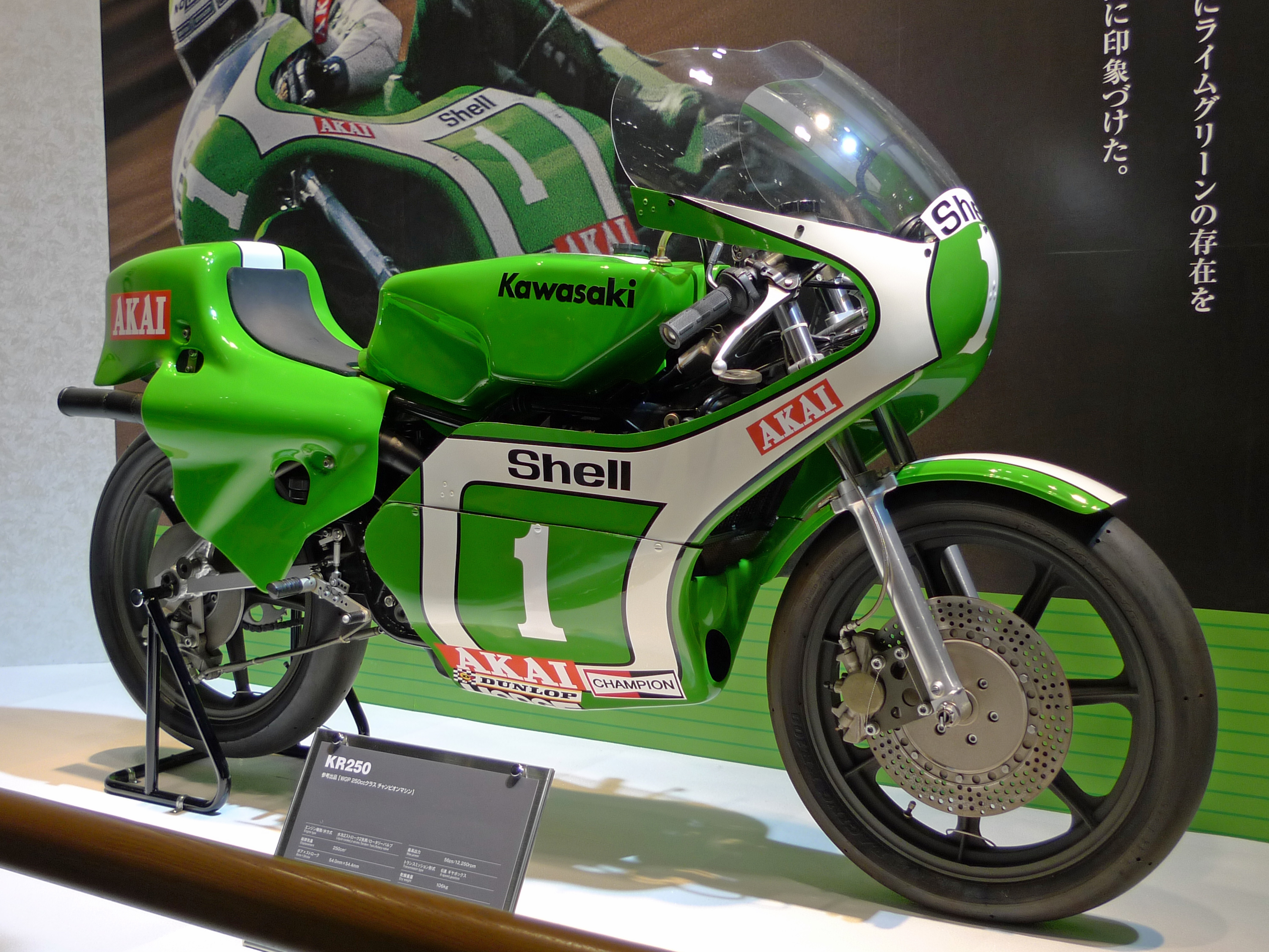 カワサキ・KR250 東京モーターショー2011にて撮影